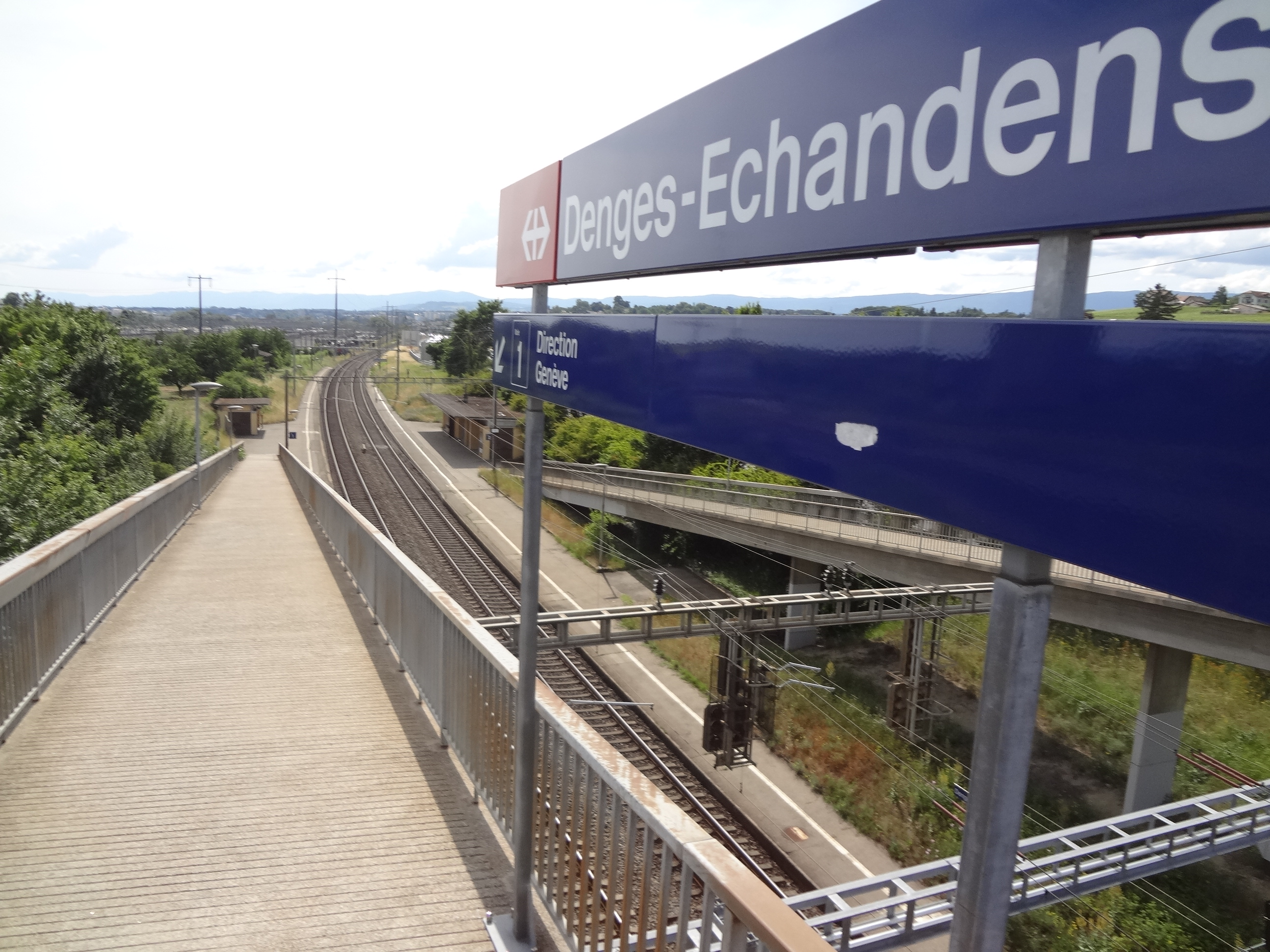 Gare de Denges vue depuis le pont reliant Denges à Échandens, en direction de Genève.